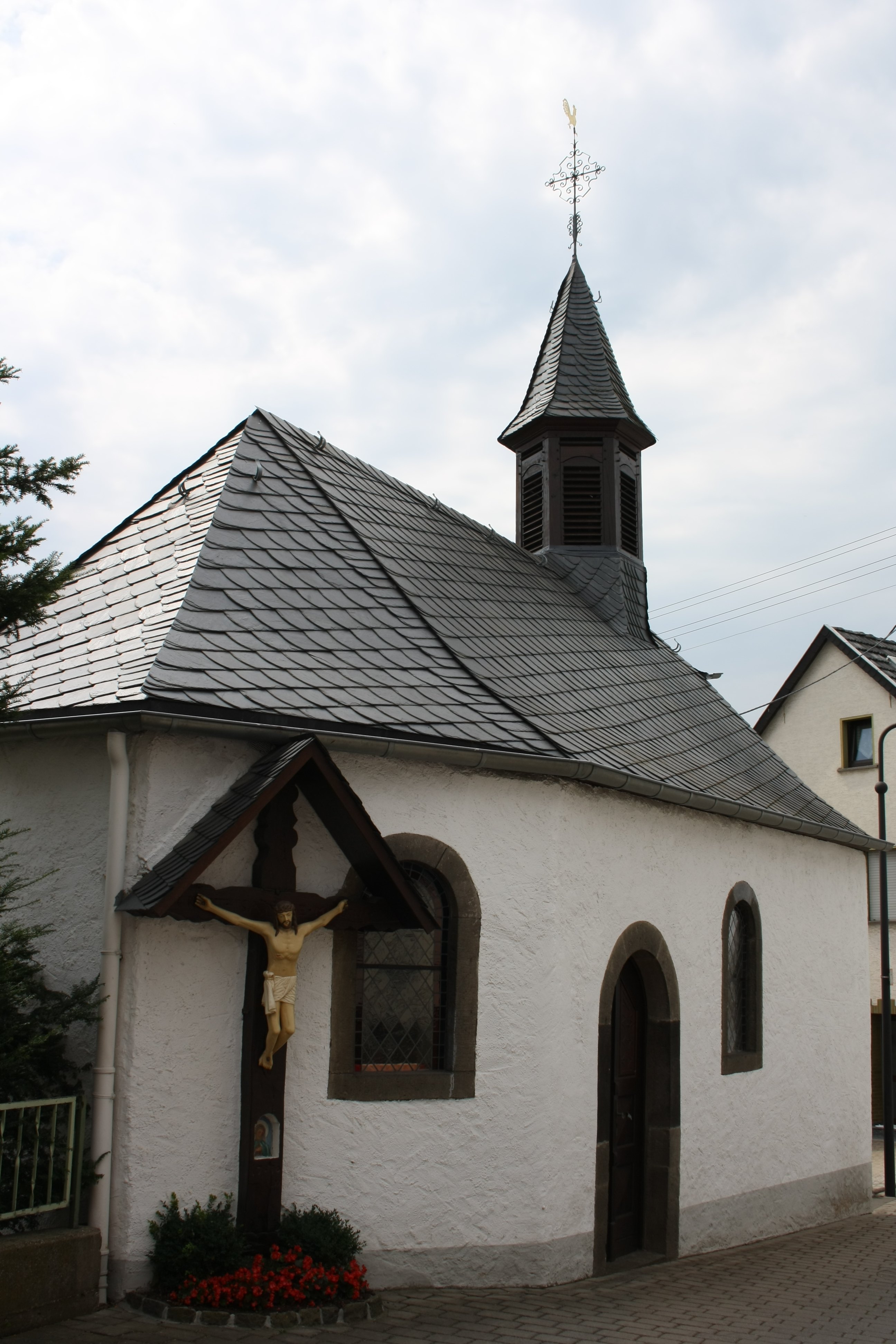 katholische Kapelle St. Thekla in Niederdürenbach, 1767 erbaut